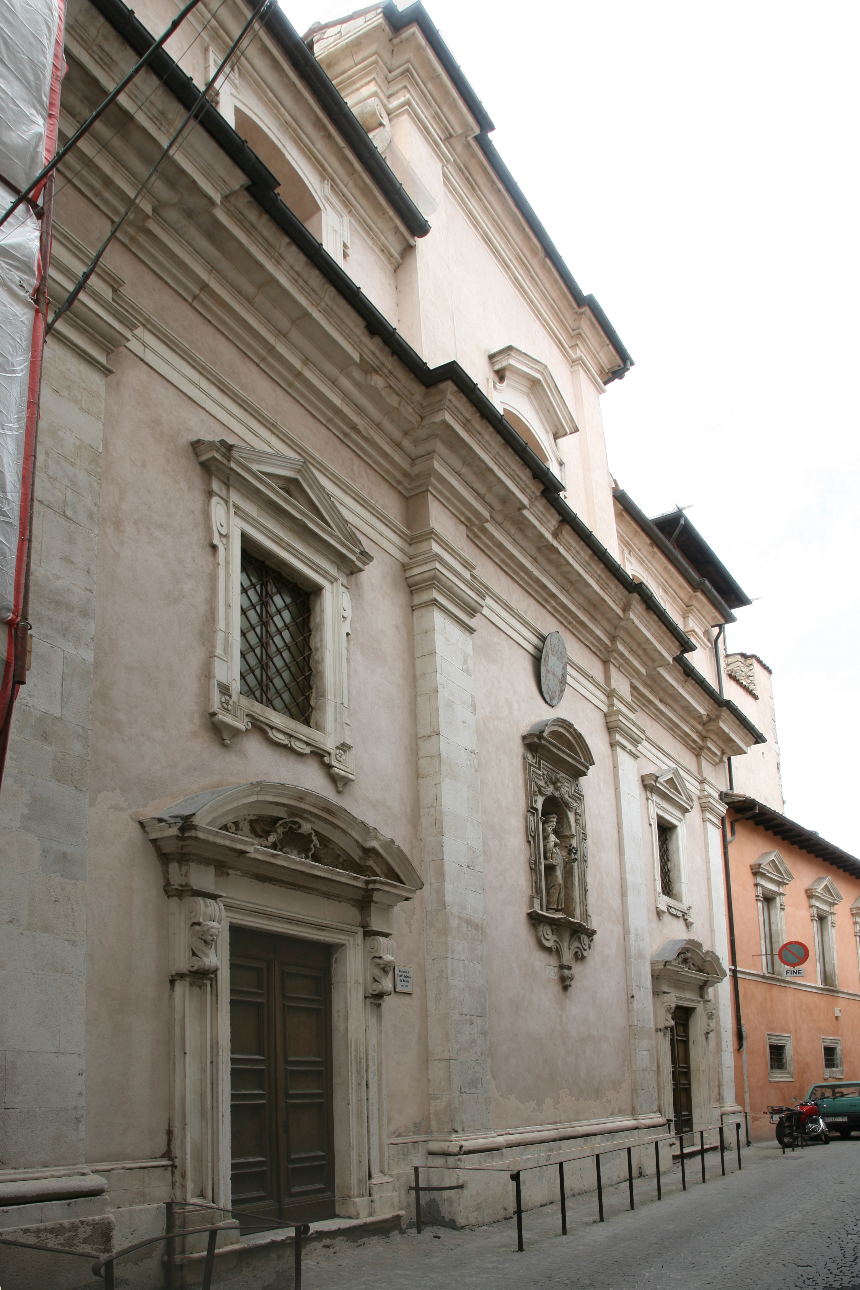 Facciata dell'Oratorio di Sant'Antonio dei Cavalieri de Nardis, via san Marciano, L'Aquila.